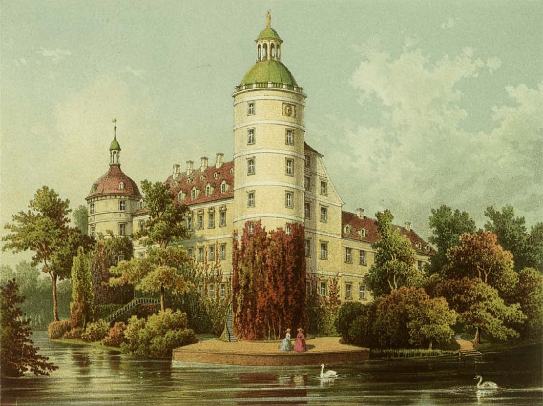 Neues Schloss in Muskau etwa zur Mitte des 19. Jahrhunderts